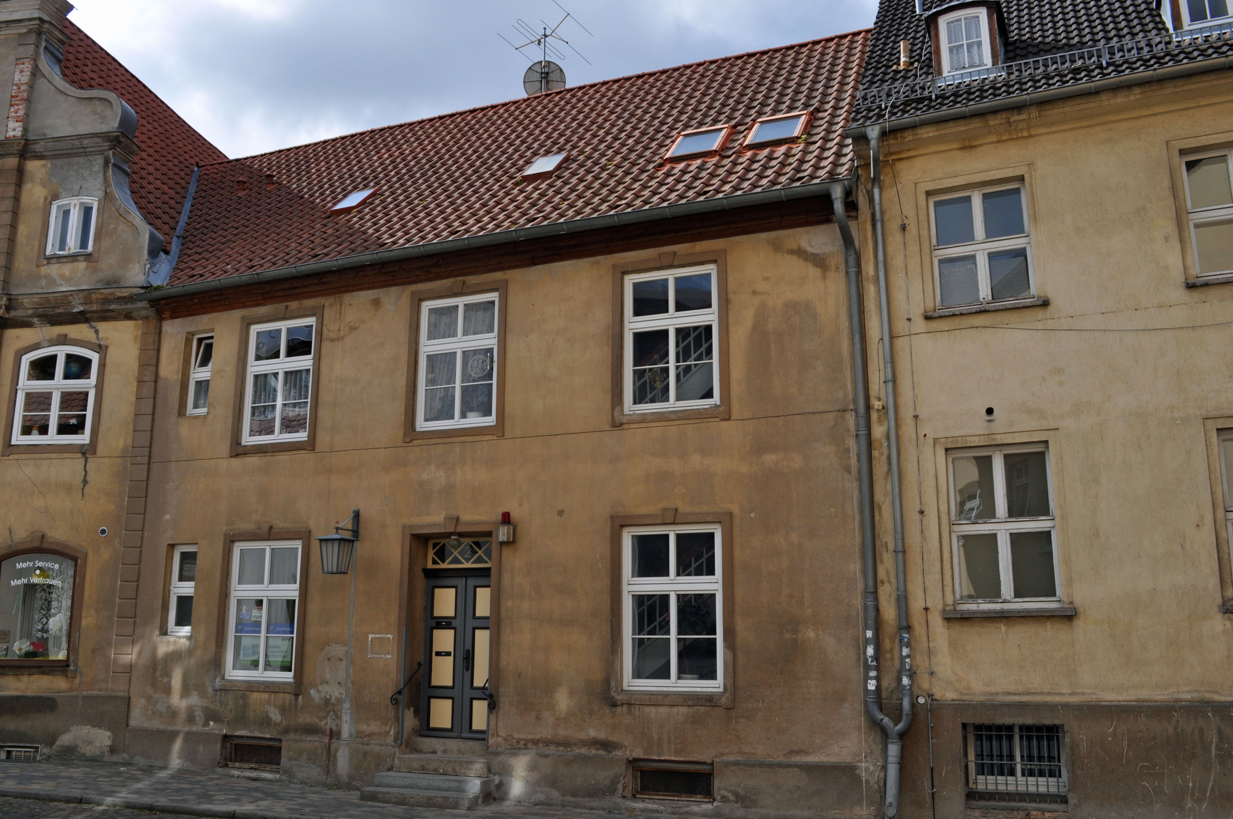 Gebäude in Stralsund, siehe Dateiname